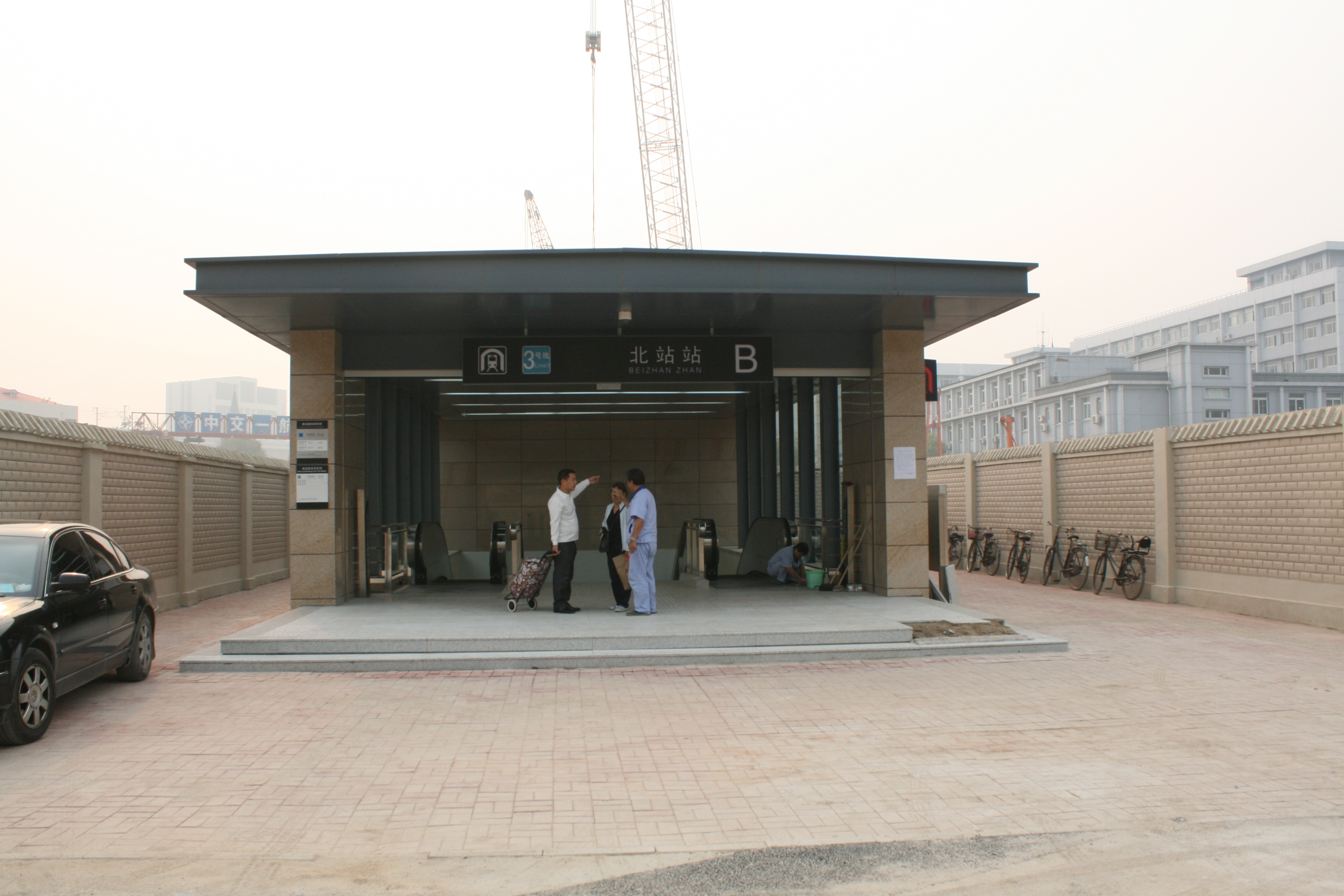 天津地鐵三號線北站B出口 0001